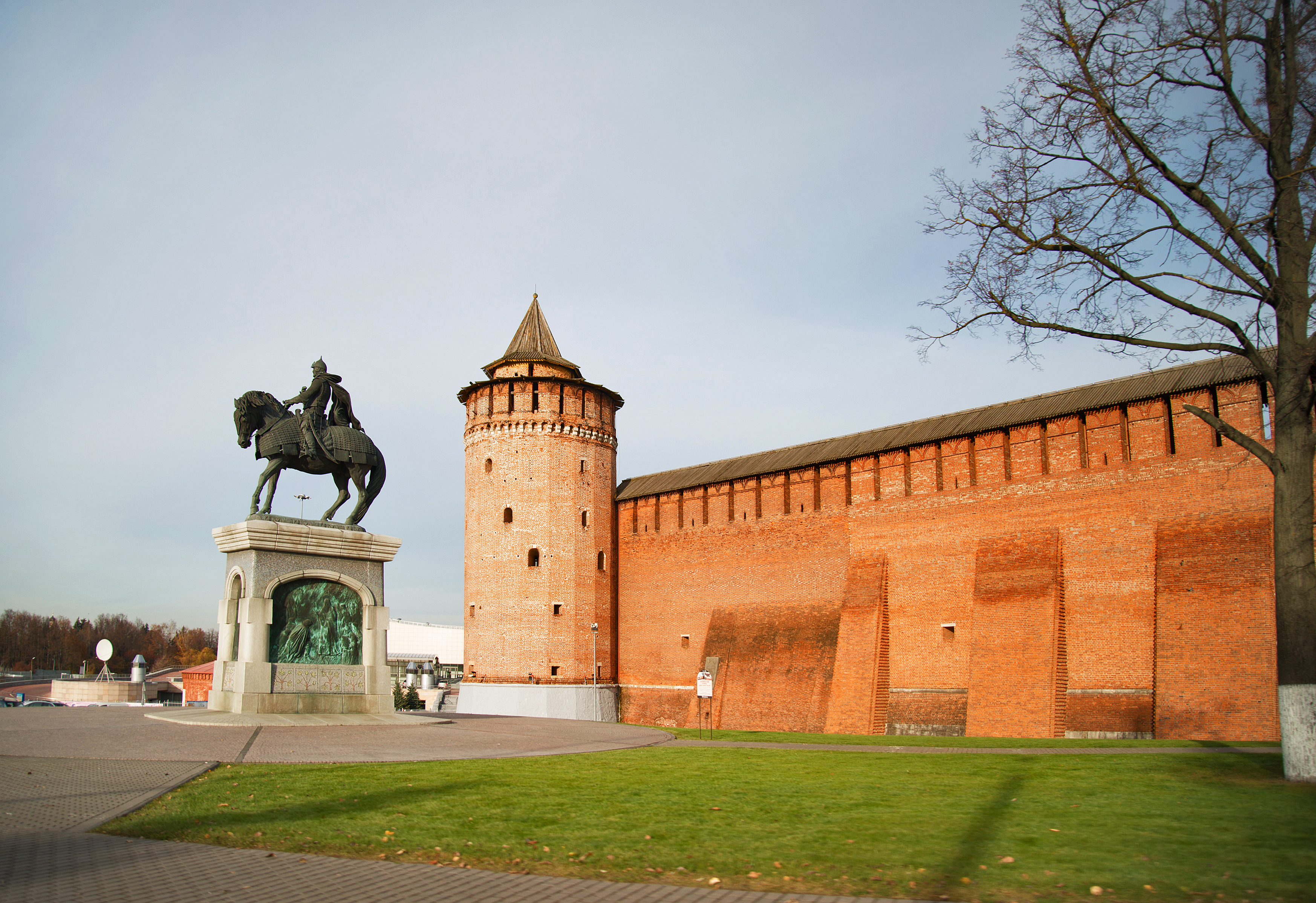 Башня Коломенская (Маринкина) (Москва и Московская область, Коломна, улица Лазарева, угол улица Октябрьской Революции)